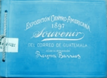 Recuerdo de la Exposición Centroamericana de 1897.